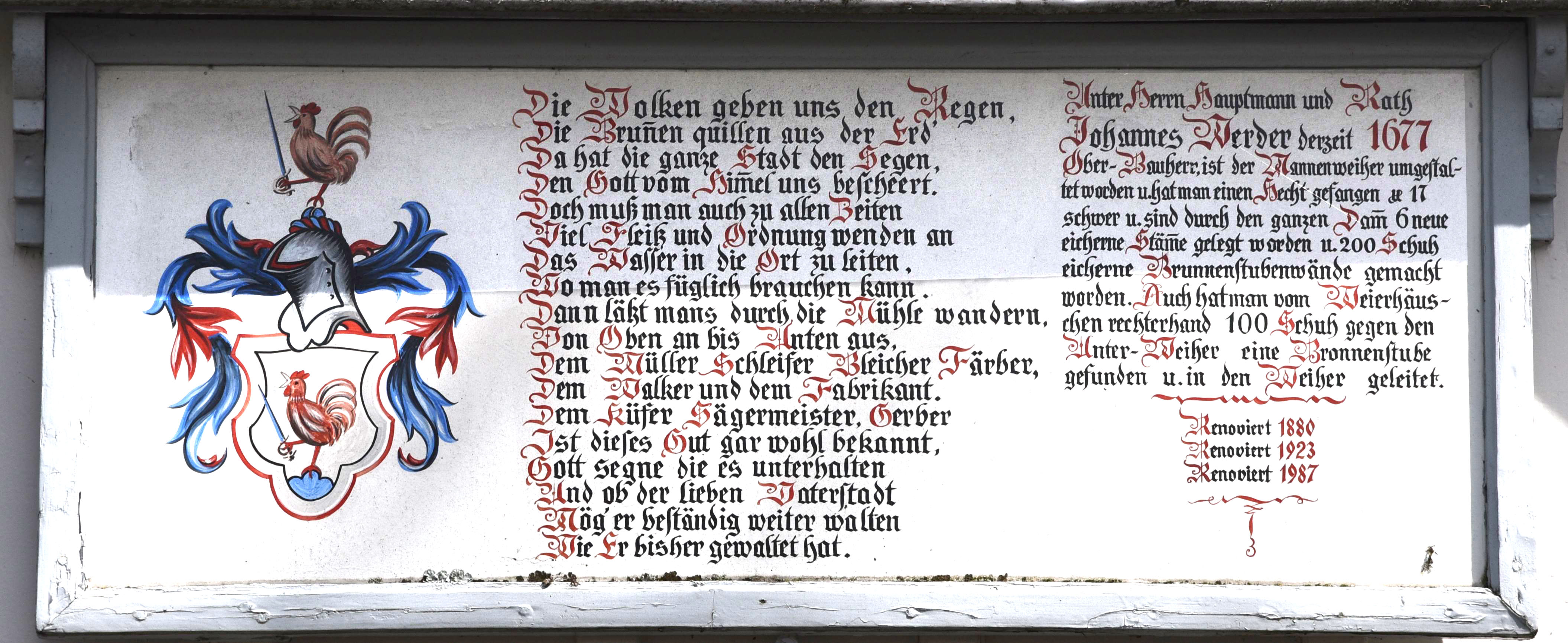 Tafel an einem Weiherhaus der Drei Weieren in St. Gallen.